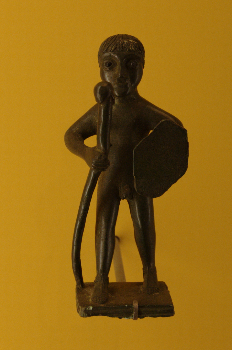 Statuette de guerrier de l'époque gallo-romaine au Musée de Bretagne, trouvée à La Bouexière.